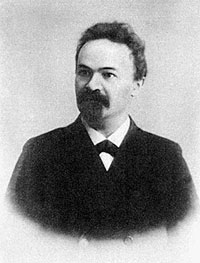 Russian Poet Nikolay Minsky